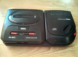 Un mega drive con sega mega cd 2